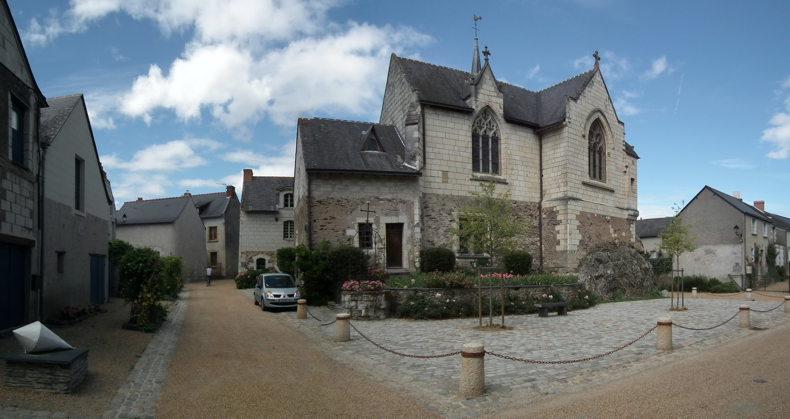 Église Notre-Dame, Béhuard, France